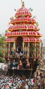 ஆண்டாள் ஆடி பூரம் தேரோட்ட உற்சவம்